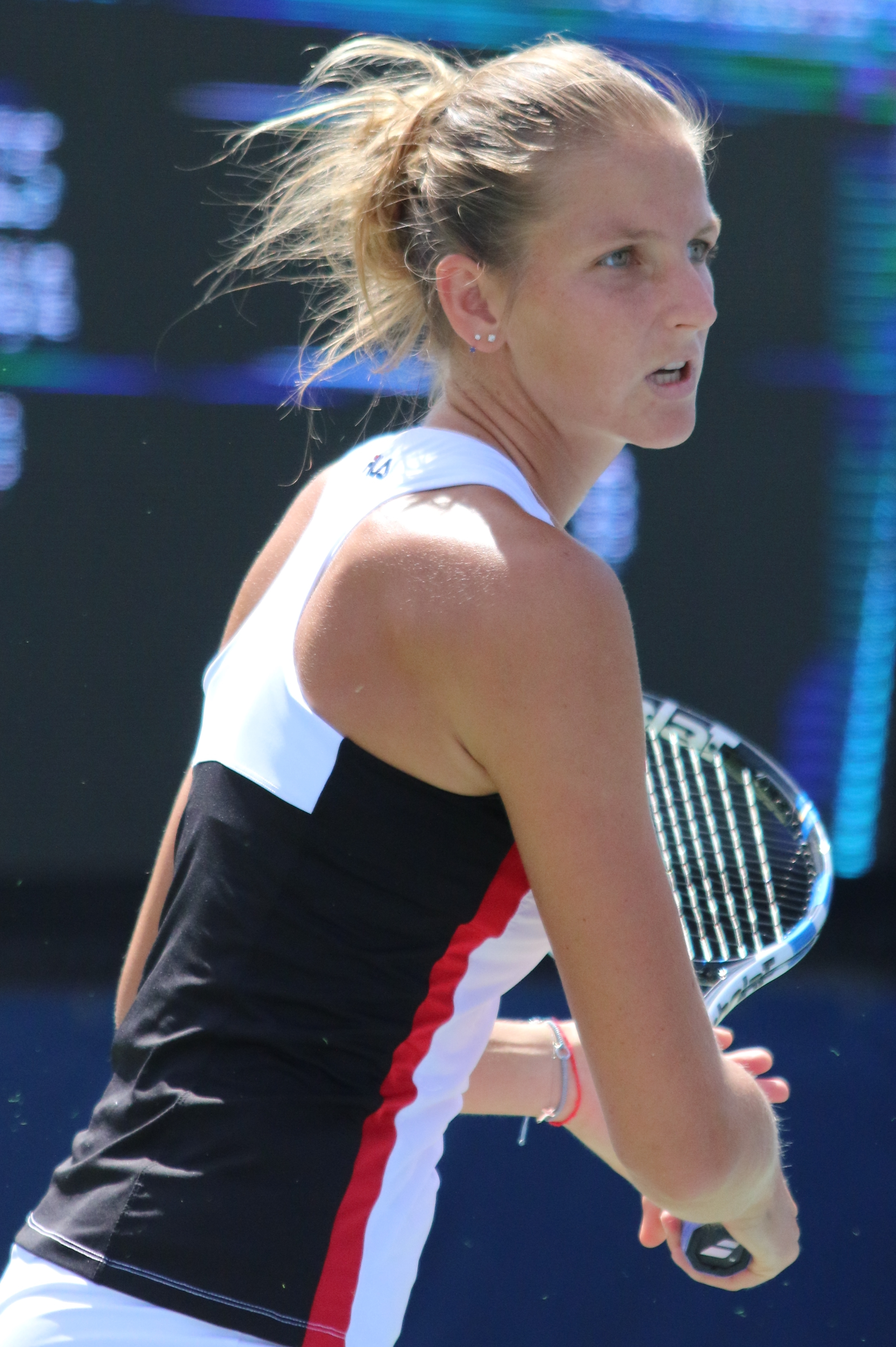 Pliskova US16 (29)